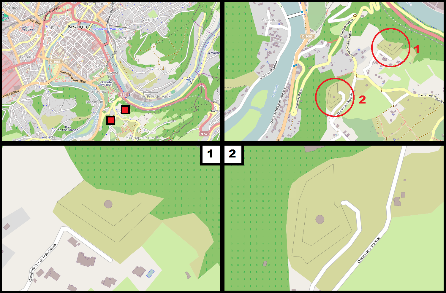 Carte des lunettes de Trois-Châtels et de Tousey réalisées sur Paint à partir d'OpenStreetMap.